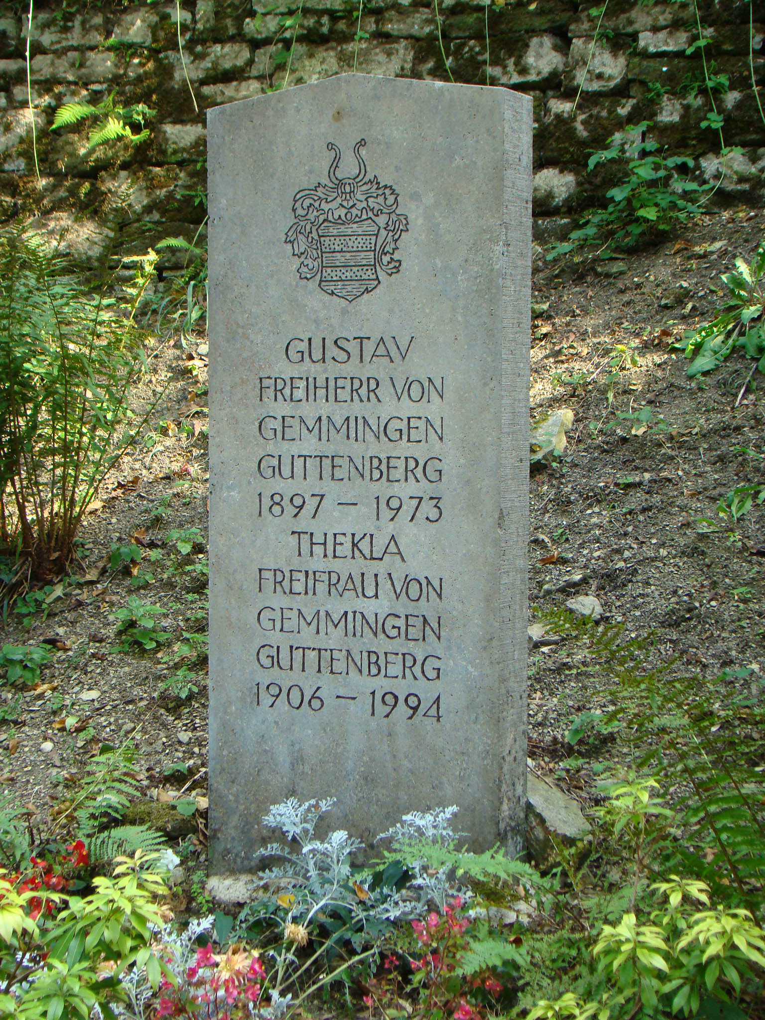 Grabmal des Gustav von Gemmingen-Guttenberg (1897-1973) und der Thekla von G.-G. (1906-1994) bei der Burgkapelle der Burg Guttenberg in Haßmersheim-Neckarmühlbach